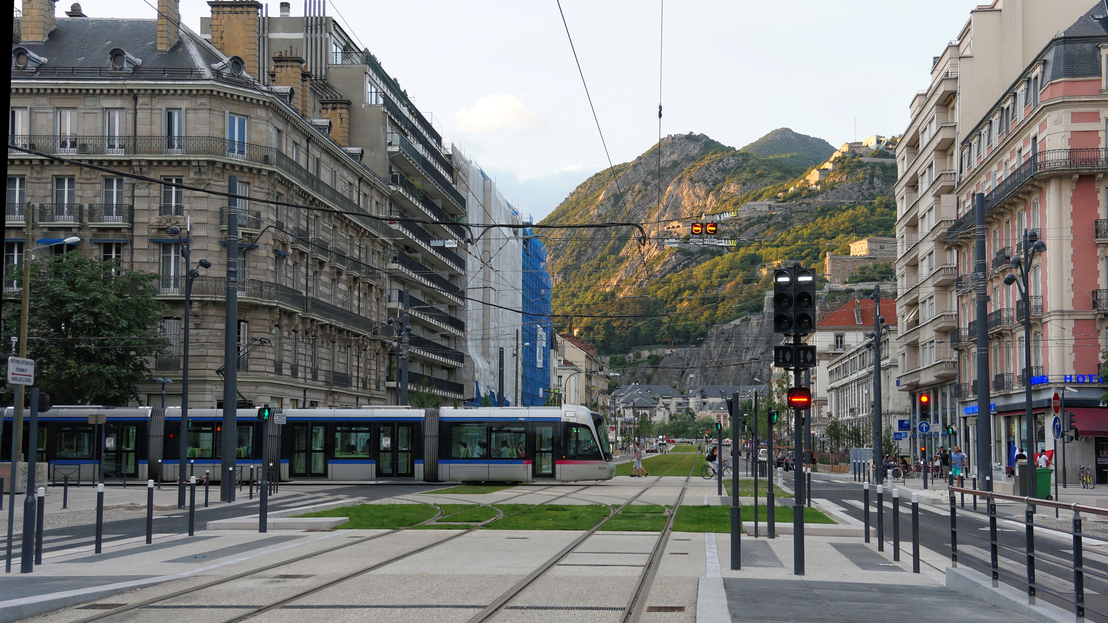 L'aiguillage des lignes A/B et ligne E du tramway de Grenoble. La rame Citadis cicule sur la section commune des lignes A & B.